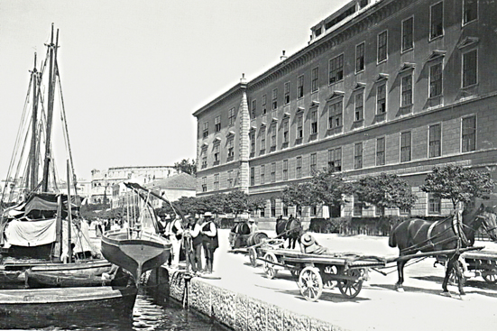 k.u.k. Infanteriekaserne in Pola (Pula)